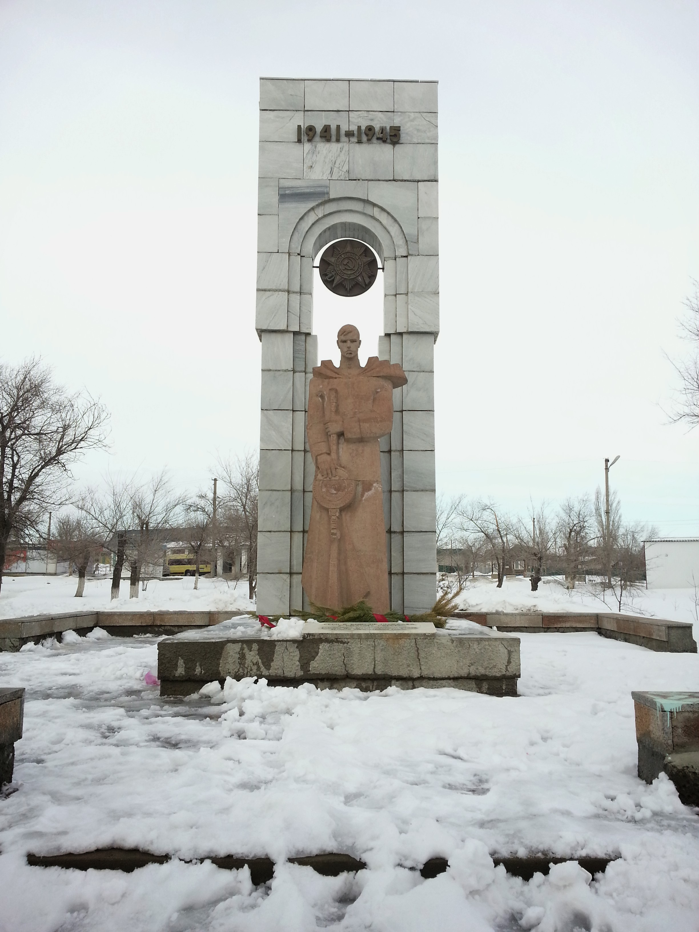 Памятник воинам-землякам погибшим в годы Великой Отечественной войны, Дубовка, Волгоградская область